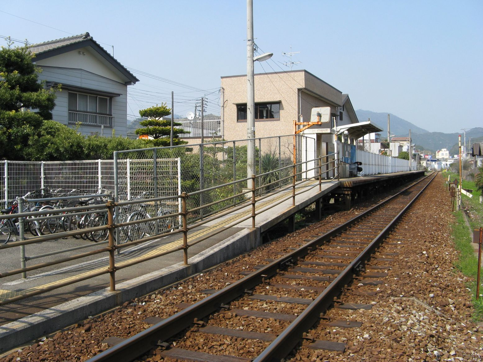 大間駅